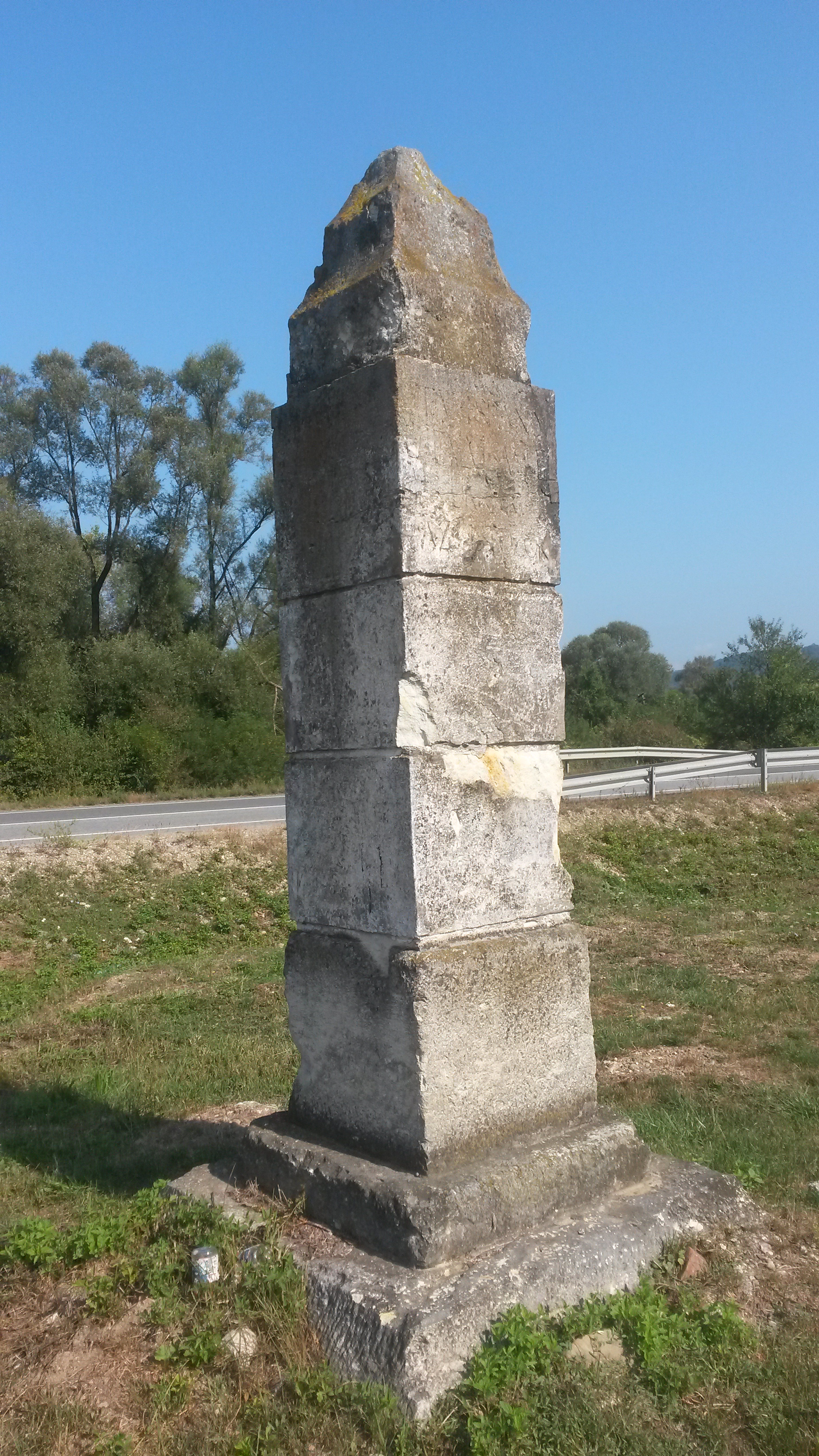 Monument amintind foametea din 1814